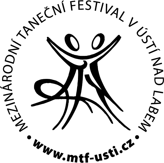 LOGO